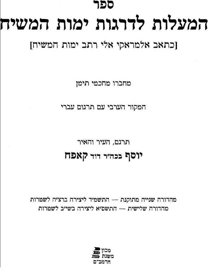 עמוד הפתיחה בספר המעלות לדרגות ימות המשיח